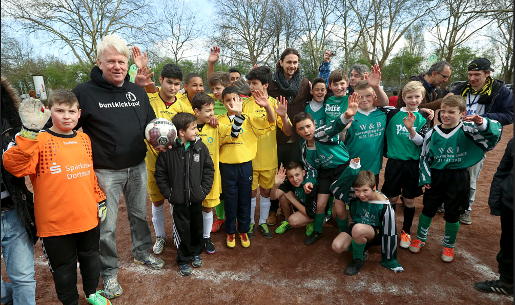 Bei buntkciktgut in Dortmund ist Neven Subotić als Schirmherr aktiv – Hier bei der Saisoneröffnung in der Nordstadt.